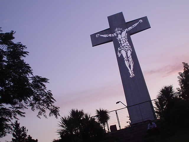 El Cristo Calado, cruz de acero de 16 m de alto ubicada en el cerro Primo de Rivera en la comuna de Maipú, Santiago de Chile. Es obra del escultor Arturo Hevia y fue bendecida el 9 de septiembre de 2000.